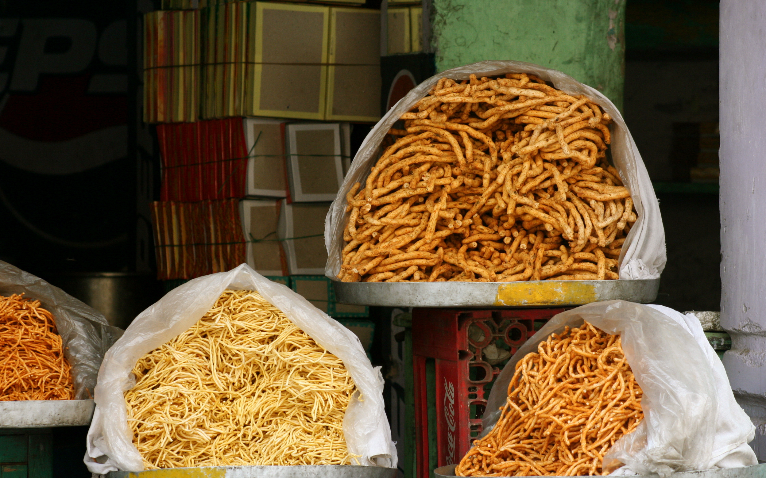 Shop selling “Bikaneri bhujia” in Jaipur, Rajasthan, Jul 2010.